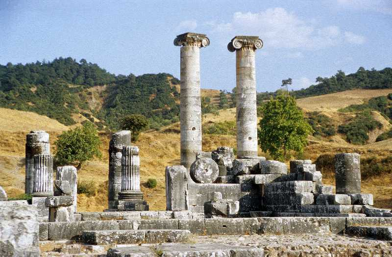 Artemistempel, Sardes, Türkei